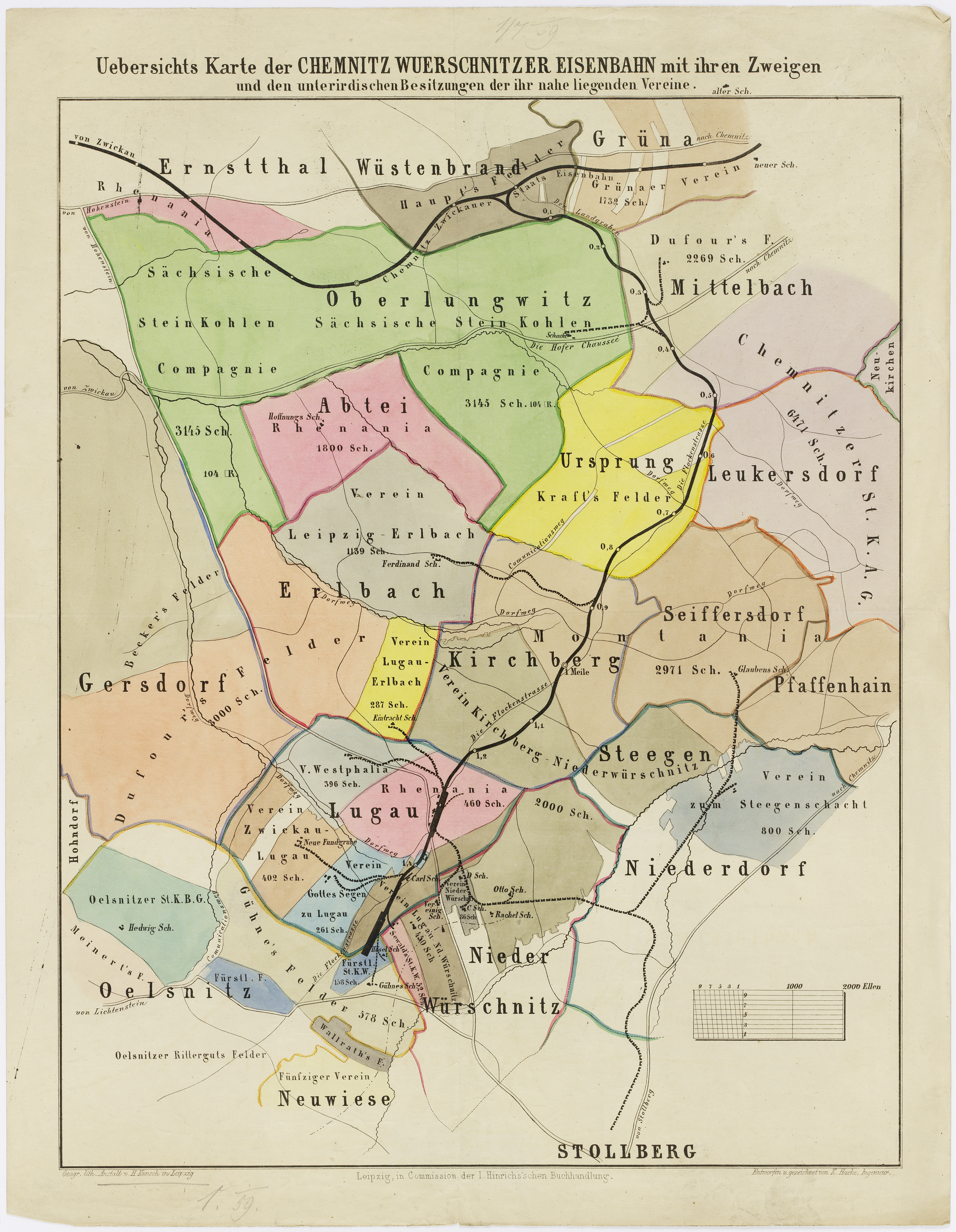 Übersichts-Karte der Chemnitz-Würschnitzer Eisenbahn mit ihren Zweigen ...